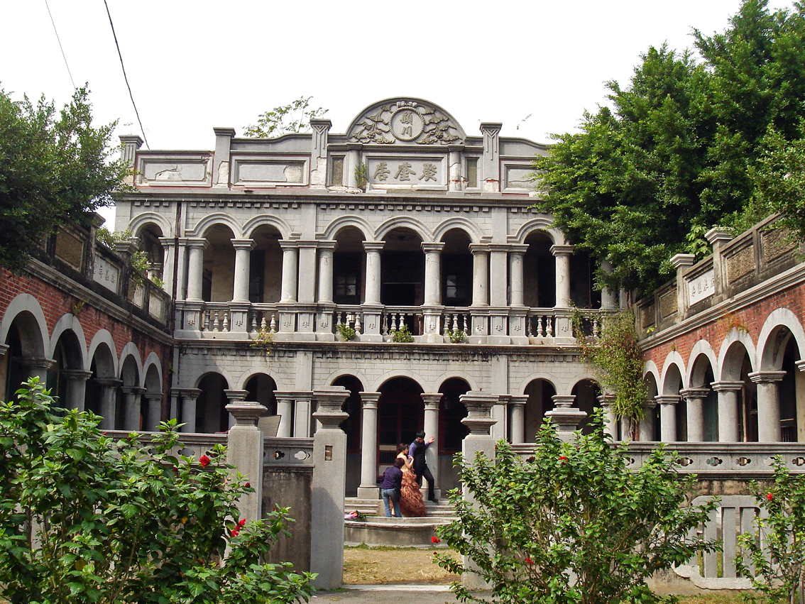 中文（台灣）: 烏日聚奎居